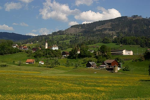 Sattel (Nr. 03.1-4567)